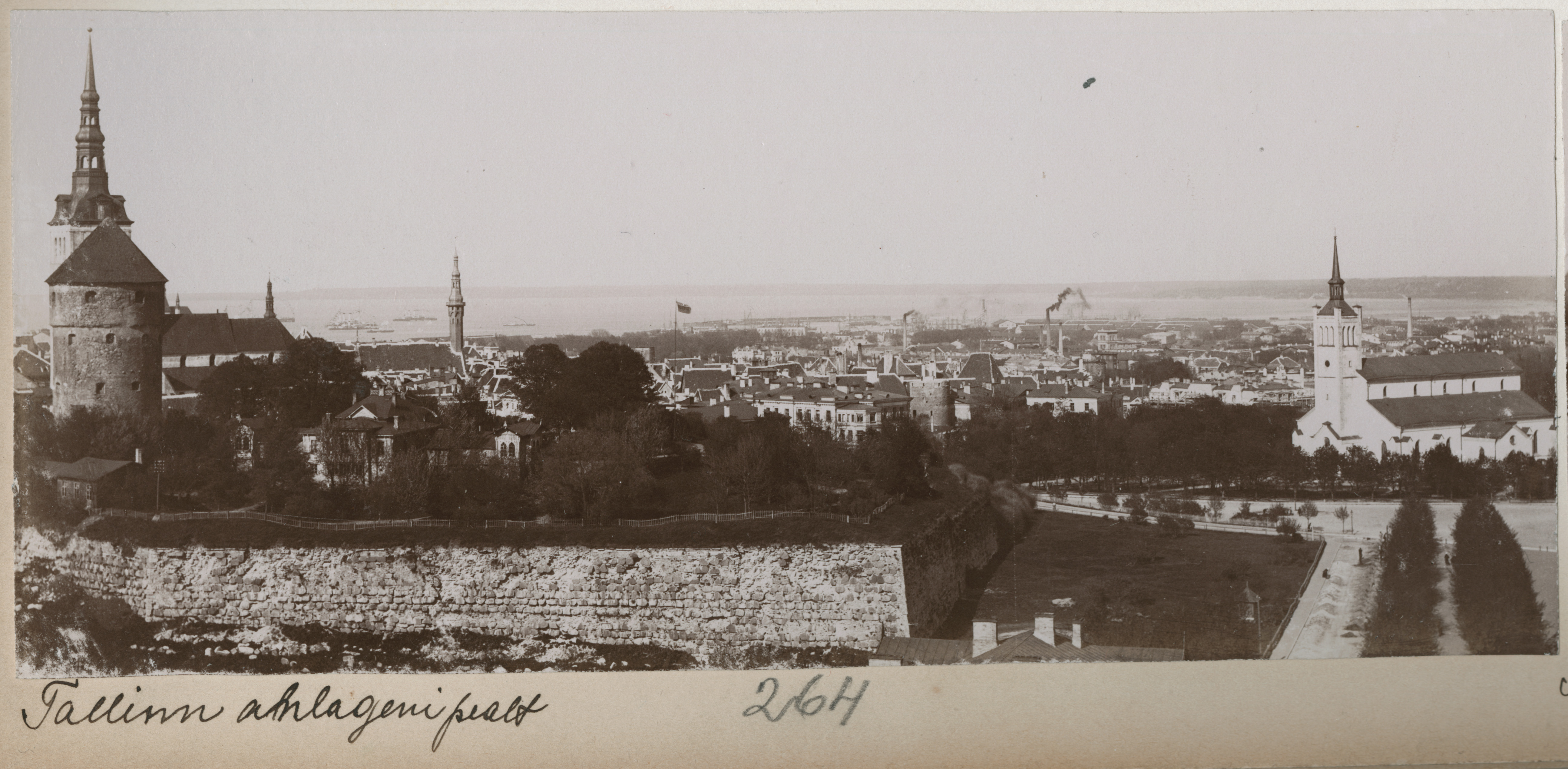 Vaade üle linna merele, arvatavasti Kaarli kiriku tellingutelt.